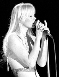 Agnetha Fältskog, ABBA, Ekeberghallen, Oslo, Norway